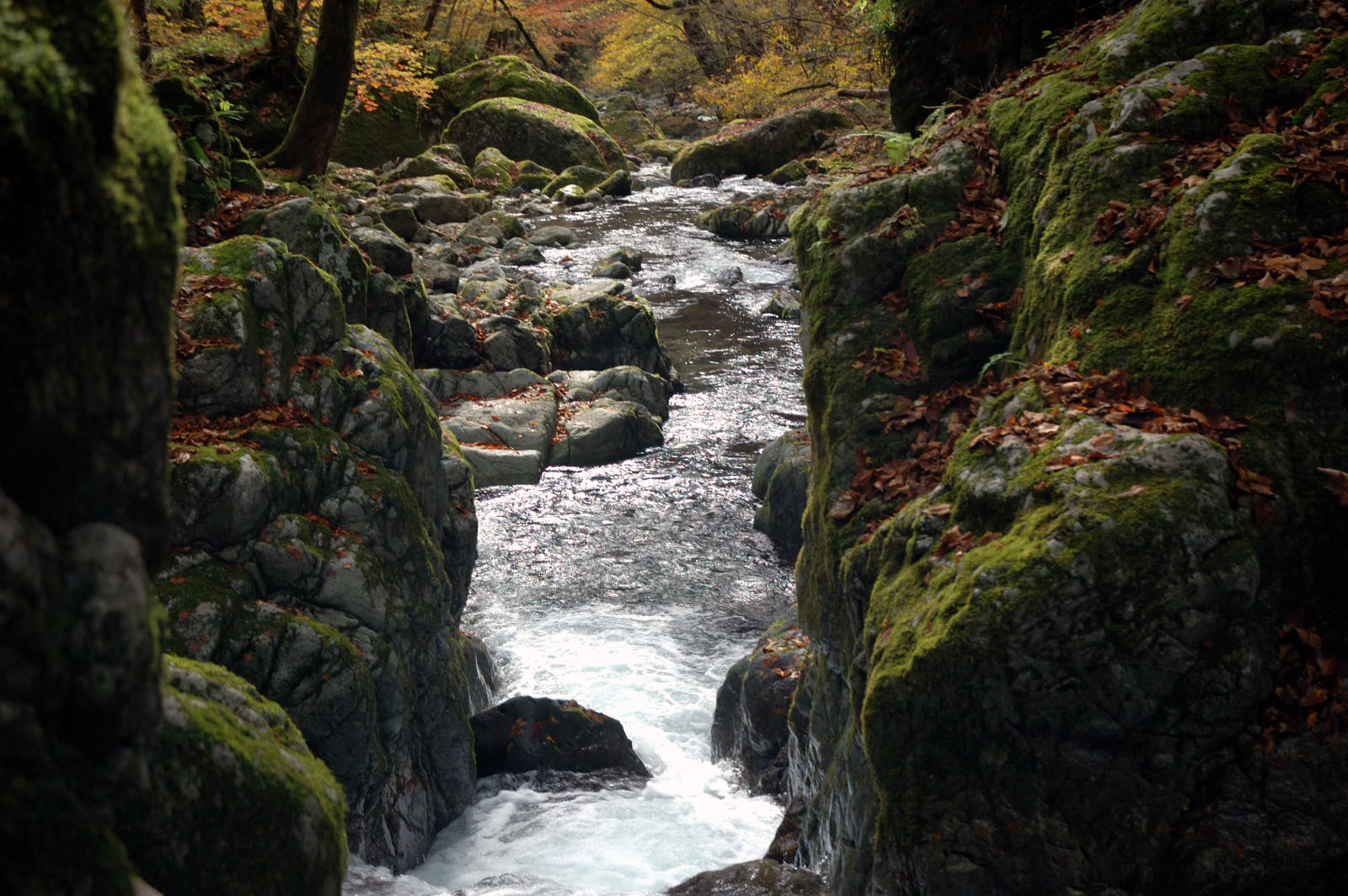 Onzui ravine